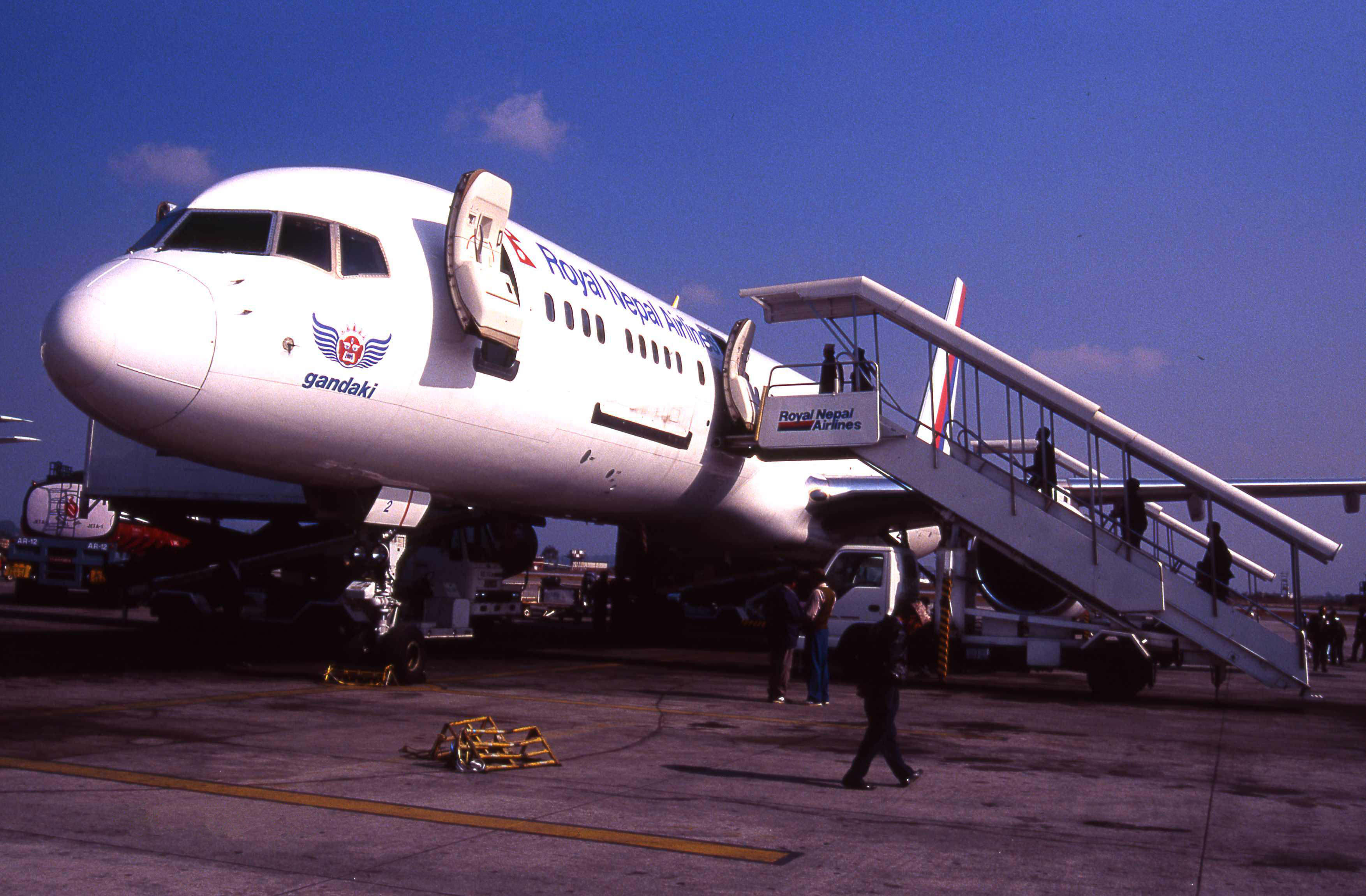 Royal Nepal Airlines ロイヤルネパールエアラインズ